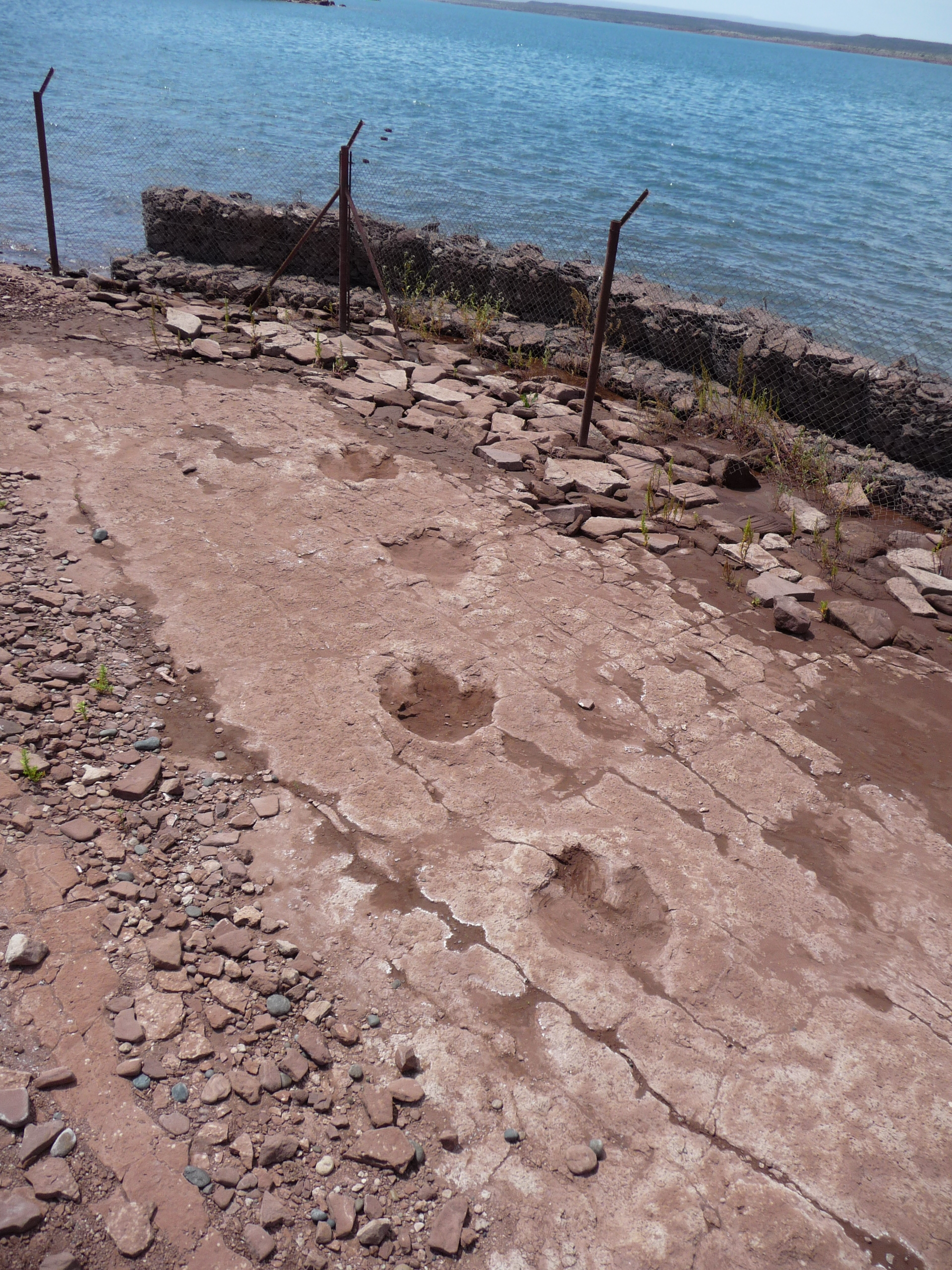 Huellas de dinosaurios en la ribera norte del embalse de El Chocón.